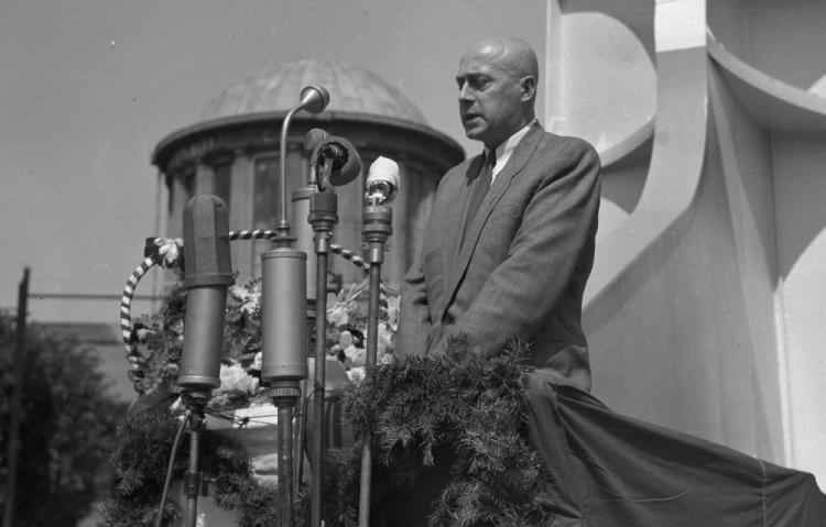 Józef Cyrankiewicz otwiera Wystawę Ziem Odzyskanych